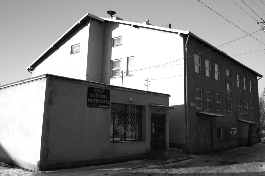 Dom ludowy w Draganowej. Wybudowany w 1988 roku. Jest siedzibą ważnych dla wsi instytucji: Gabinetu lekarskiego, Biblioteki, Urzędu Pocztowego, Remizy OSP, sali weselnej z zapleczem kuchennym. Obok Domu Ludowego jeden z trzech w Draganowej sklepów spożywczych.